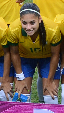 Mayara da Fonseca Bordin